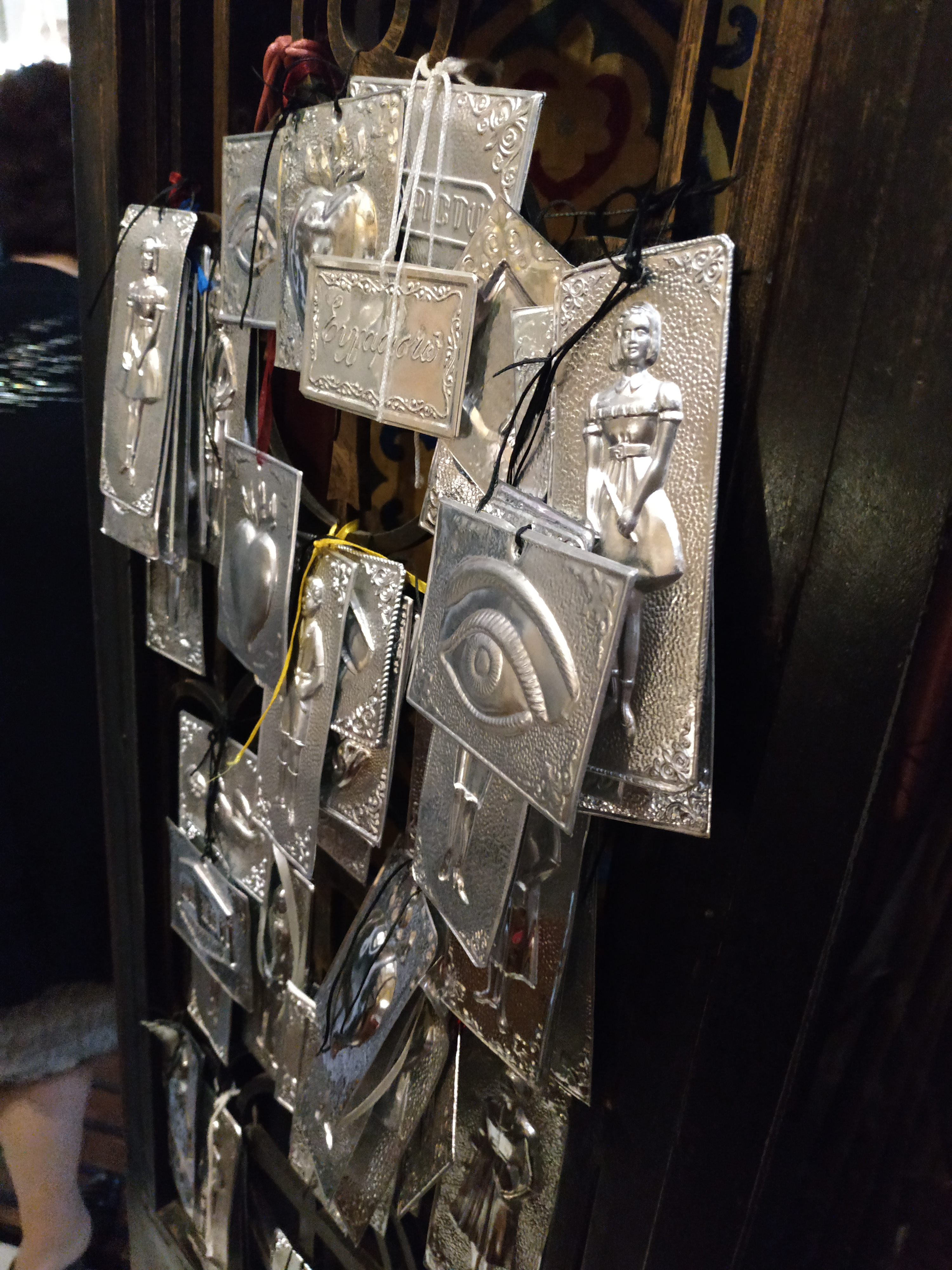 Пожертви православних прихожан біля раки мощей святого Димитрія Солунського